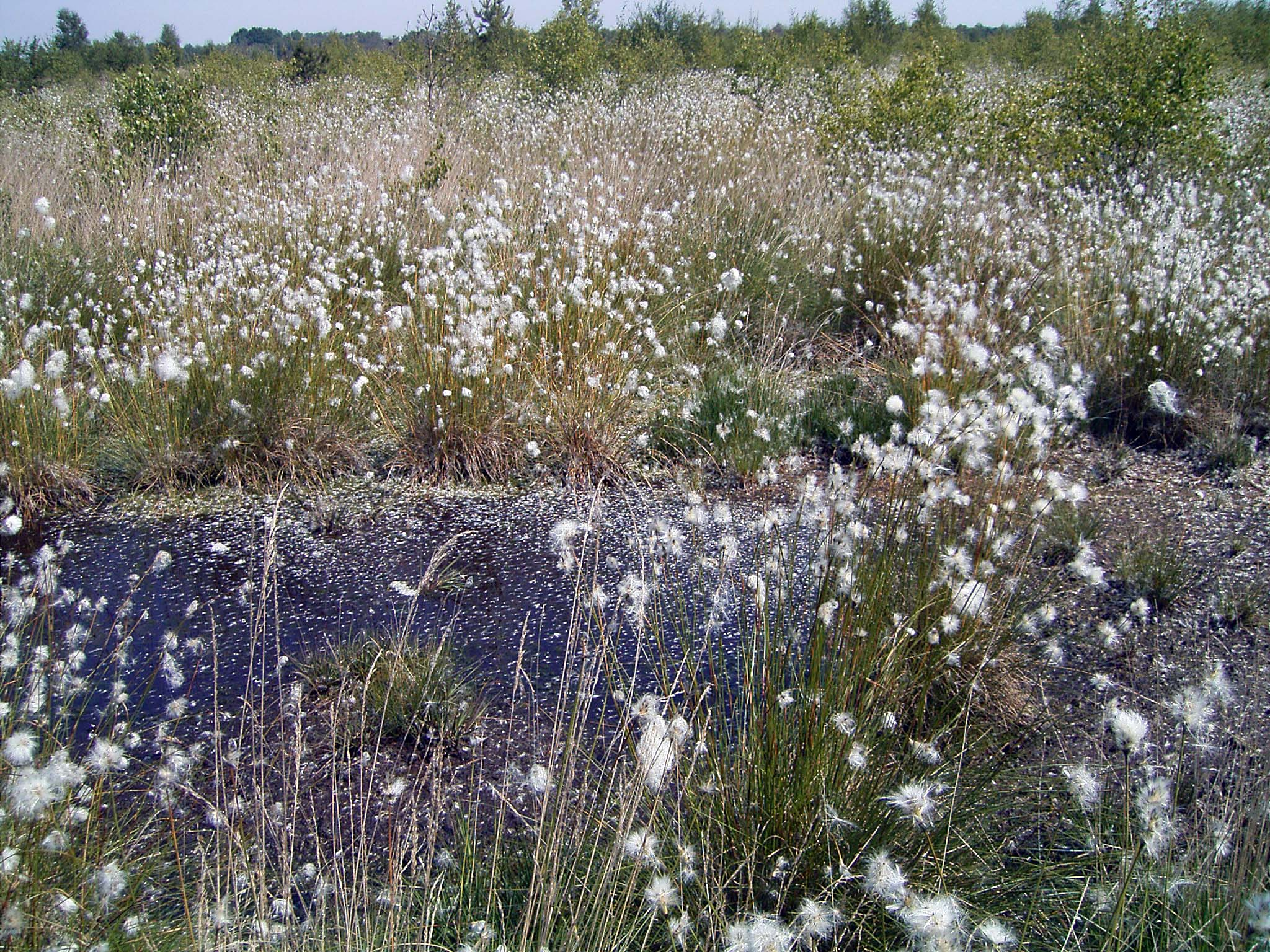 Scheiden-Wollgras (Eriophorum vaginatum), NSG Hahnenmoor (Niedersachsen)